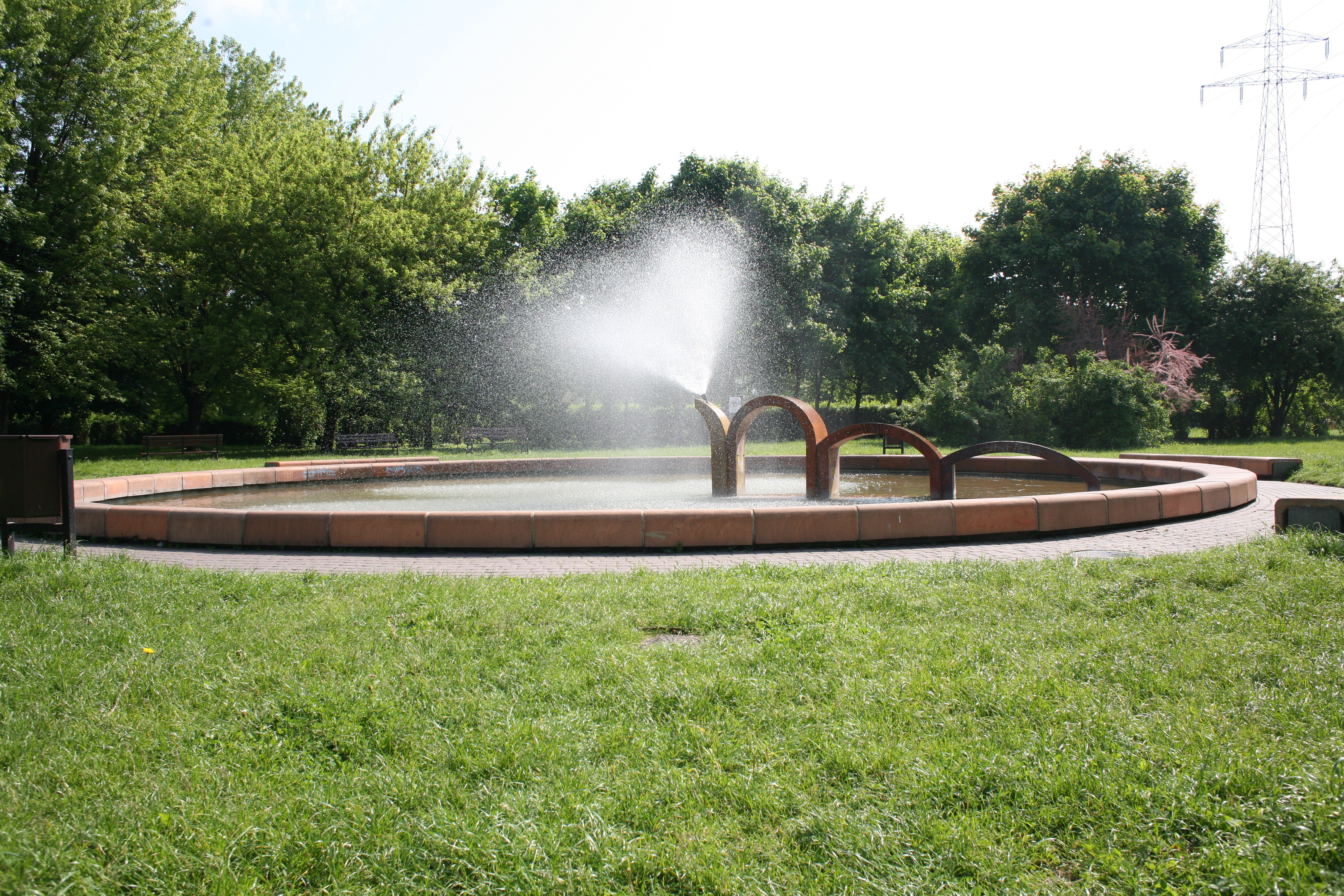 Fontanna w parku Podolskiego